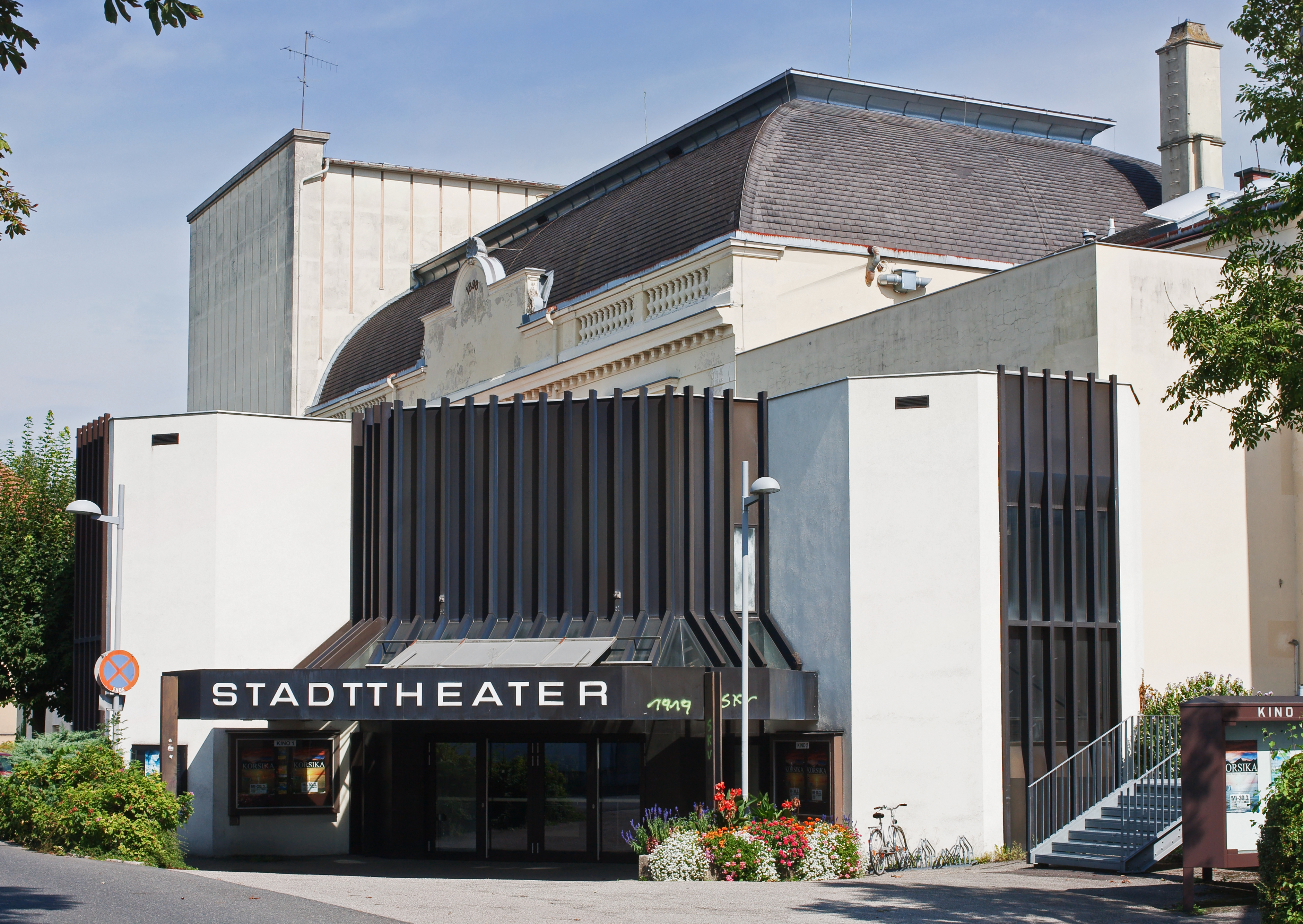 Das Steyrer Stadttheater (Industriehalle)